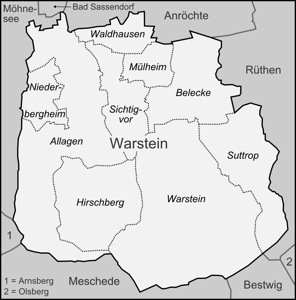 Karte der Ortsteile der Stadt Warstein im Kreis Soest